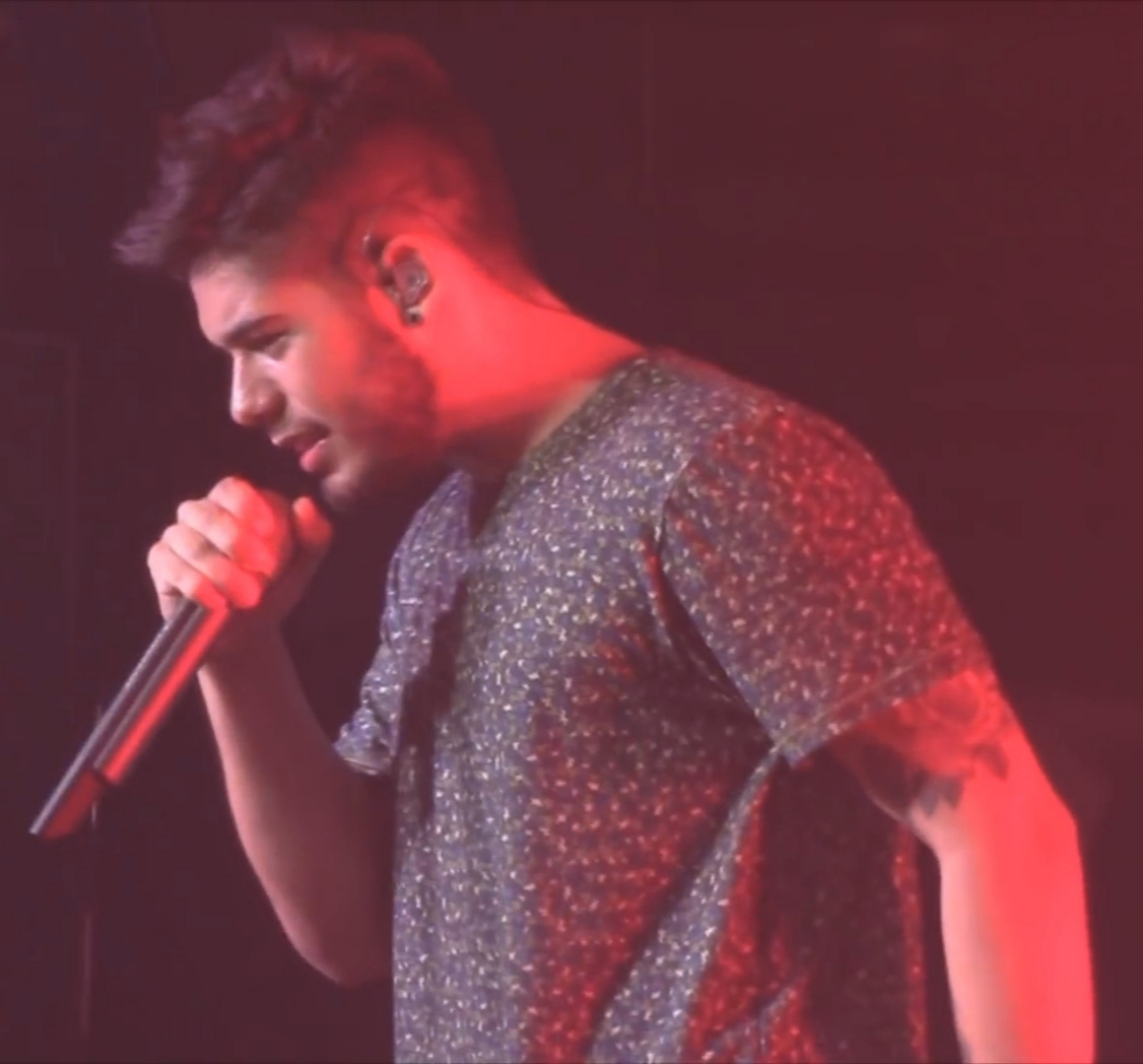 Zé Felipe em 2016.